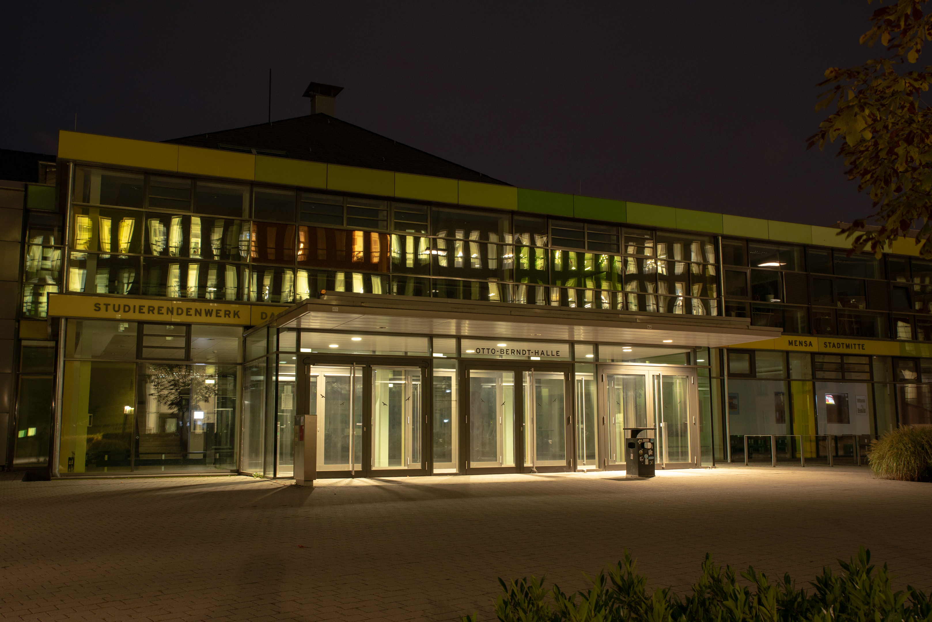 Eingangsbereich der Otto-Berndt Halle mit neu gestalteter Fassade